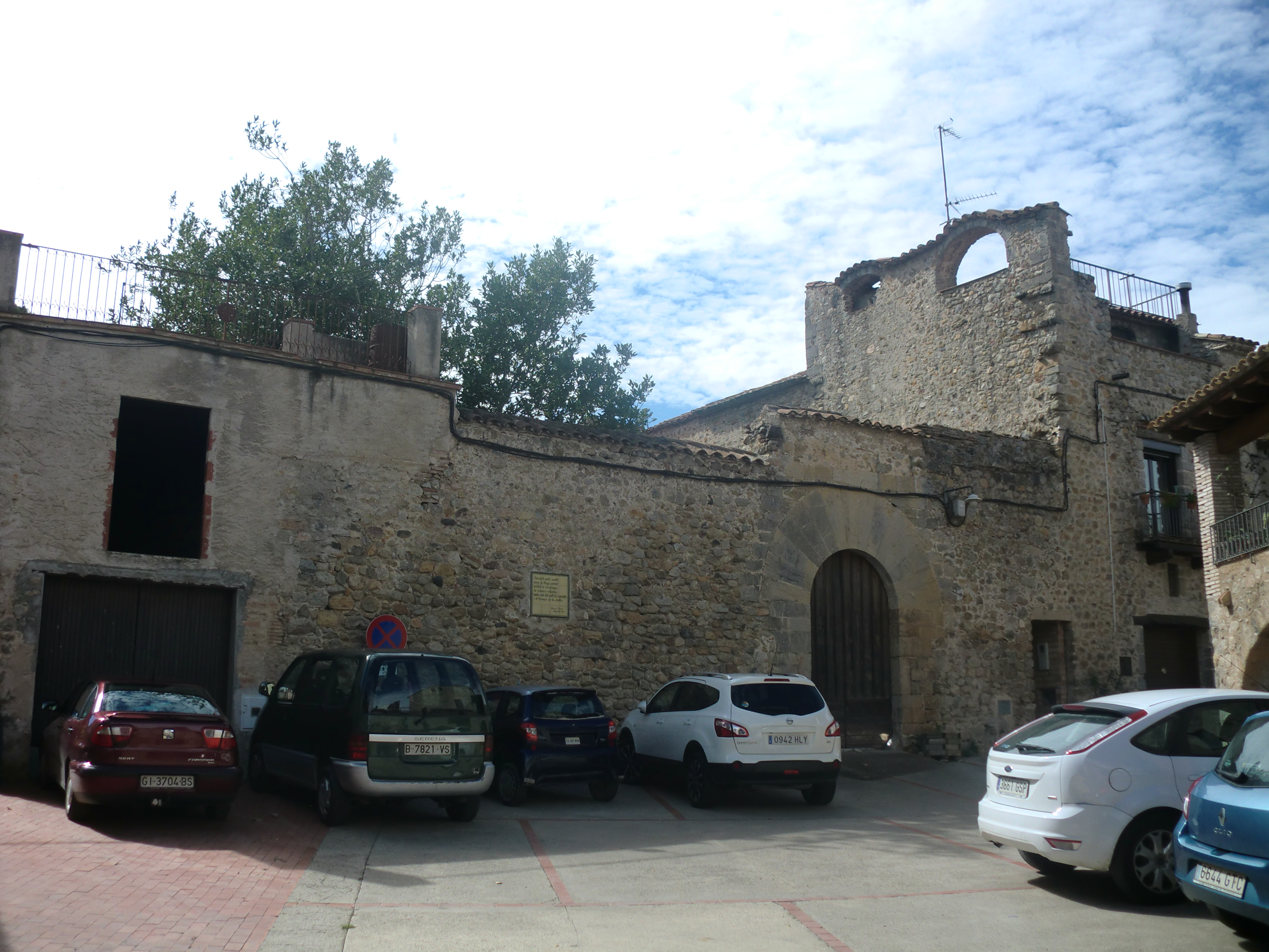 Castell palau de Boadella (Boadella i les Escaules)